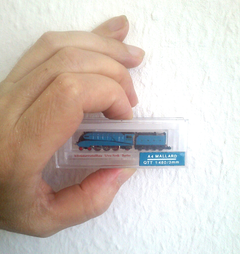 Model Steam Locomotive in T Gauge